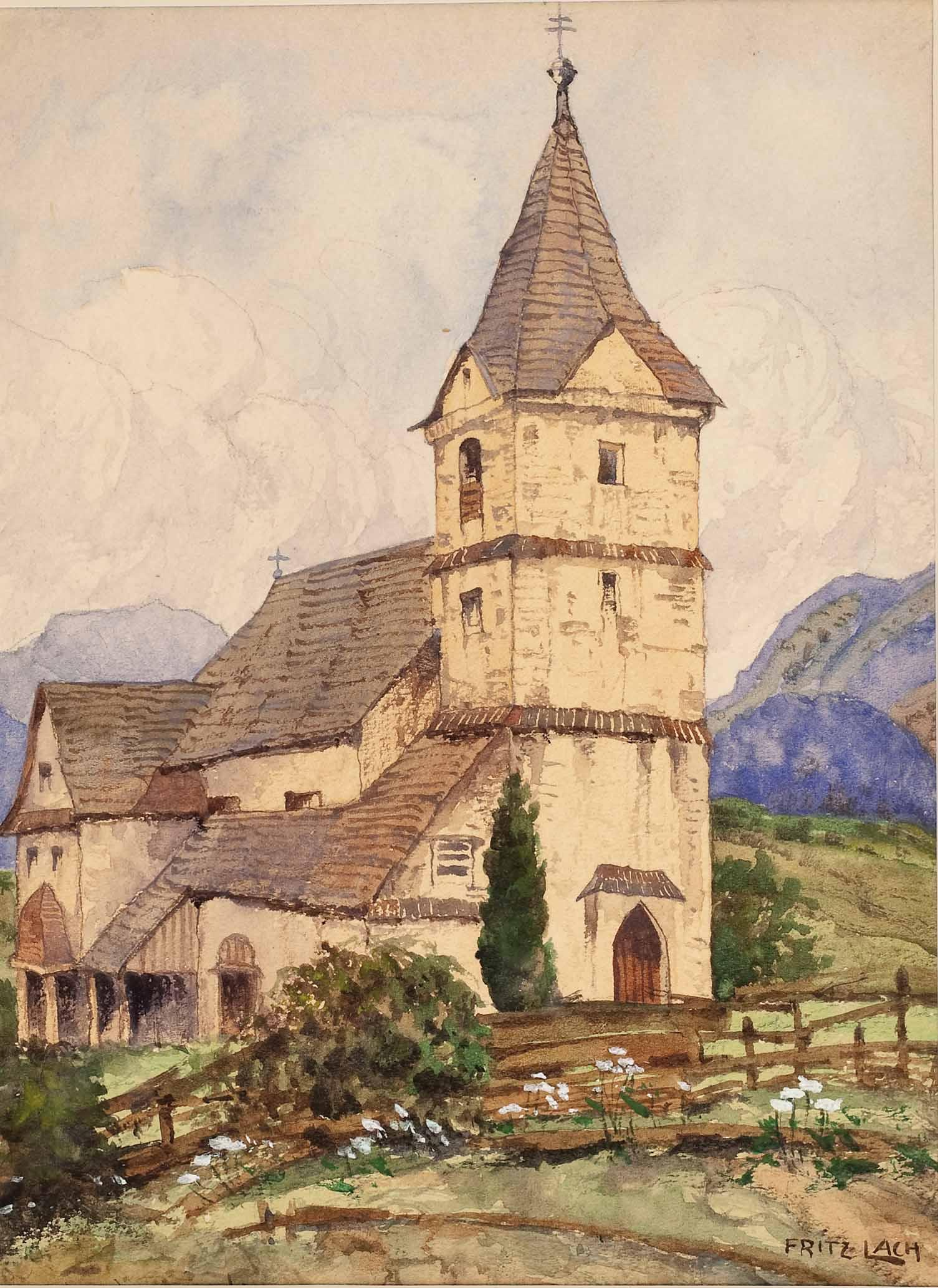 Die Leonsteiner Kirche (Gemeinde Grünburg).label QS:Lde,"Die Leonsteiner Kirche (Gemeinde Grünburg)."